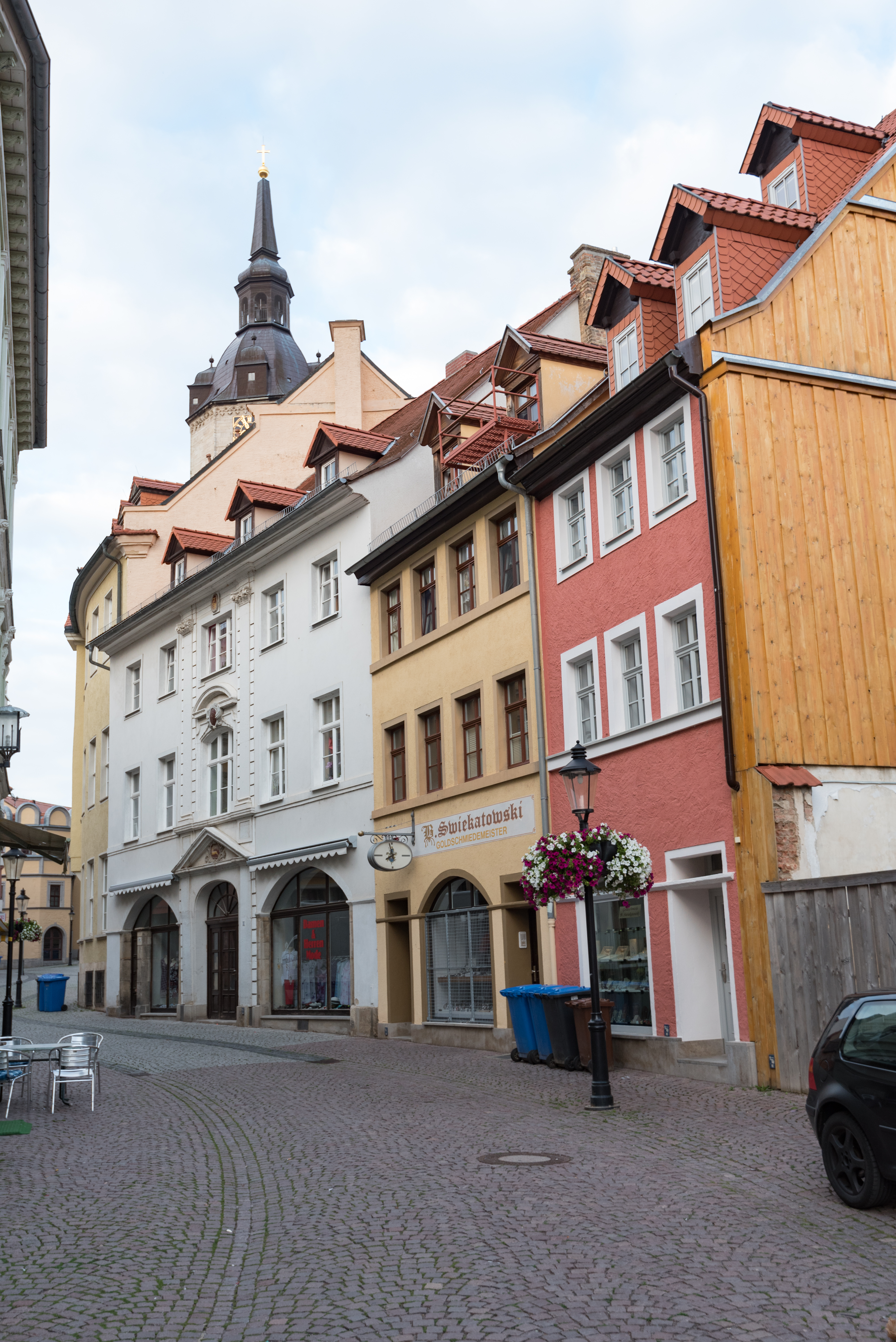 Naumburg (Saale), Salzstraße 43, 42, 41